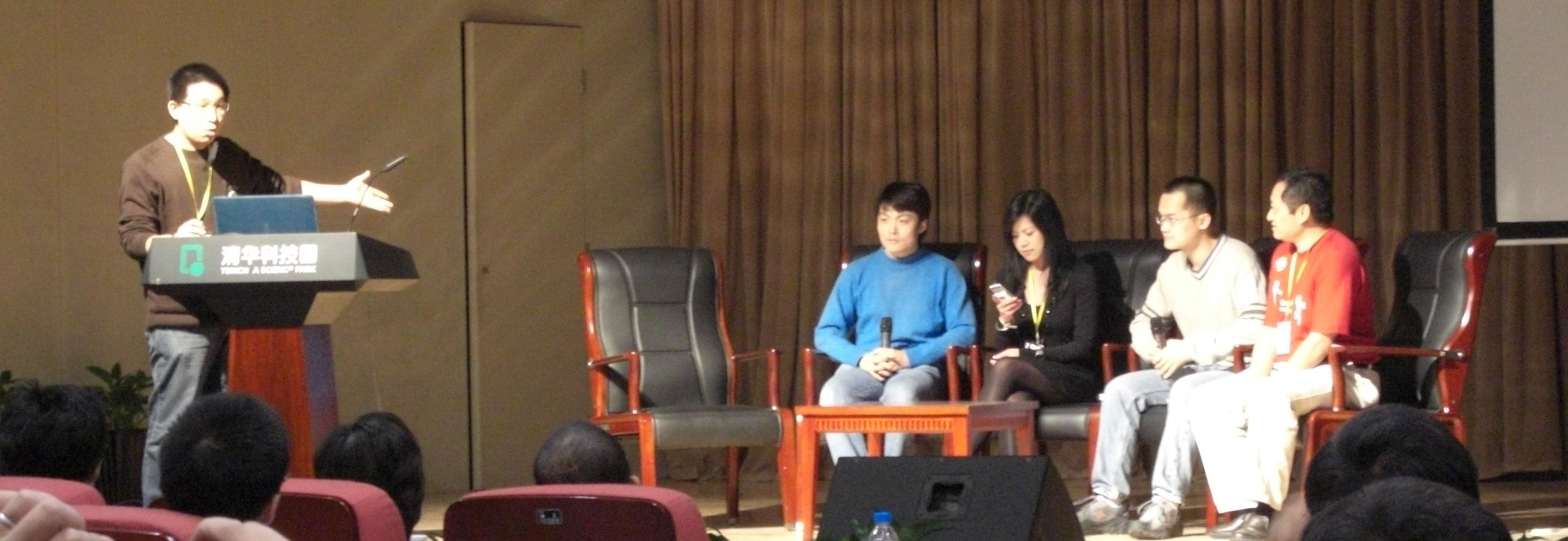 Microblogging panel, Chinese Blogger conference 2007